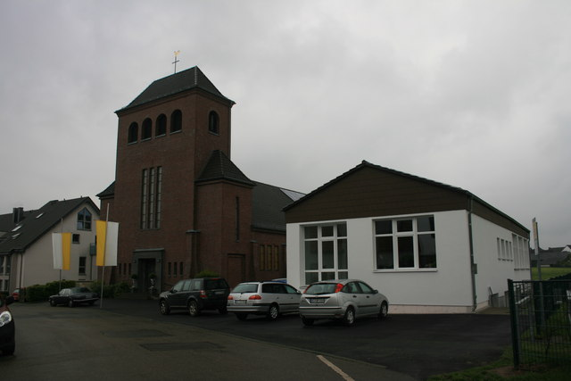 Katholische St. Barbara-Kirche in Pannesheide (seit 1908 Kohlscheid), Herzogenrath, 9 km from Aachen, Deutschland (Zone 32).